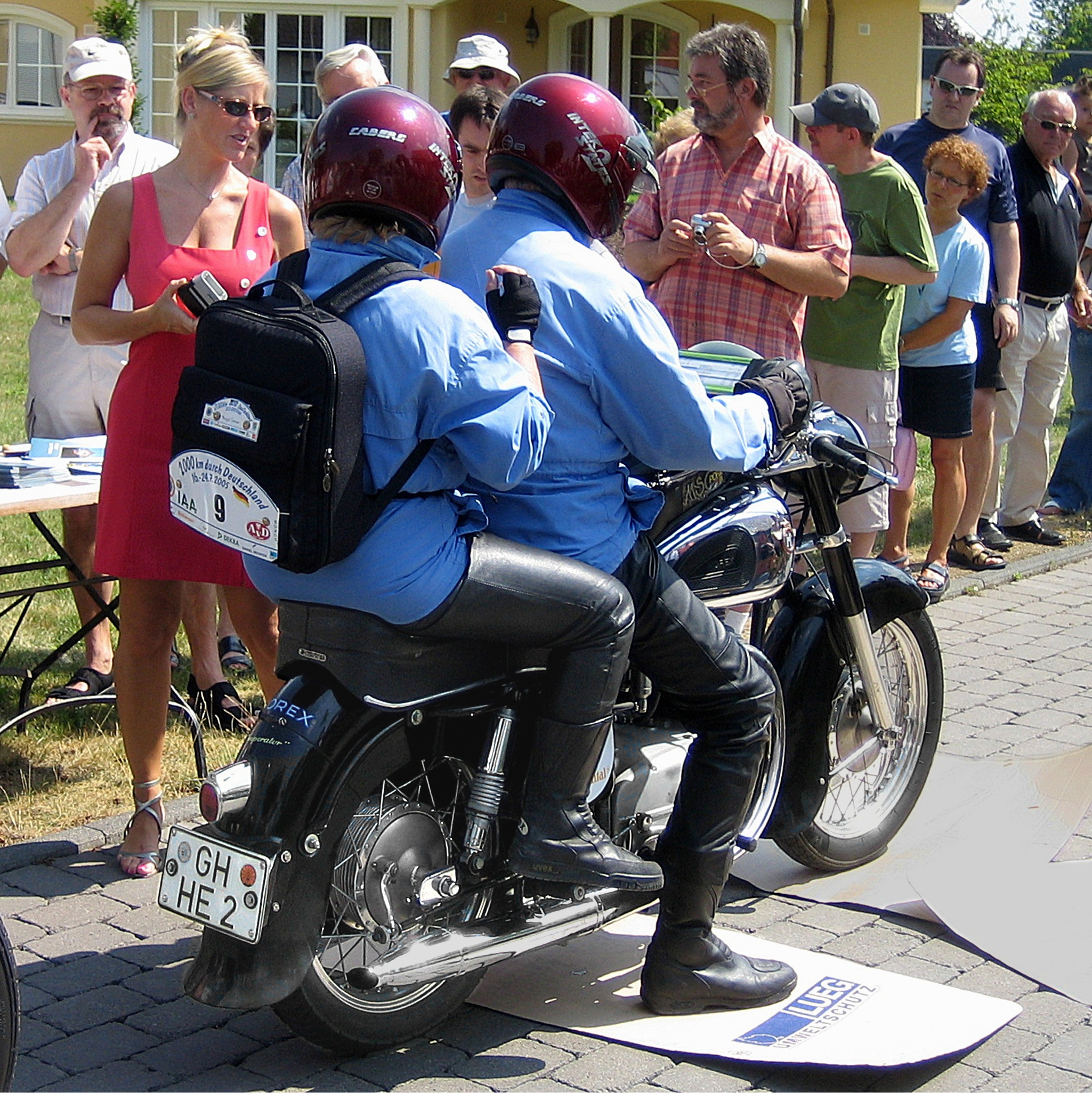 Horex Imperator, Baujahr 1955-56, bei der Oldtimerrallye „2000 km durch Deutschland“ an der Kontrollstelle Mülheim-Kärlich, Gewerbepark